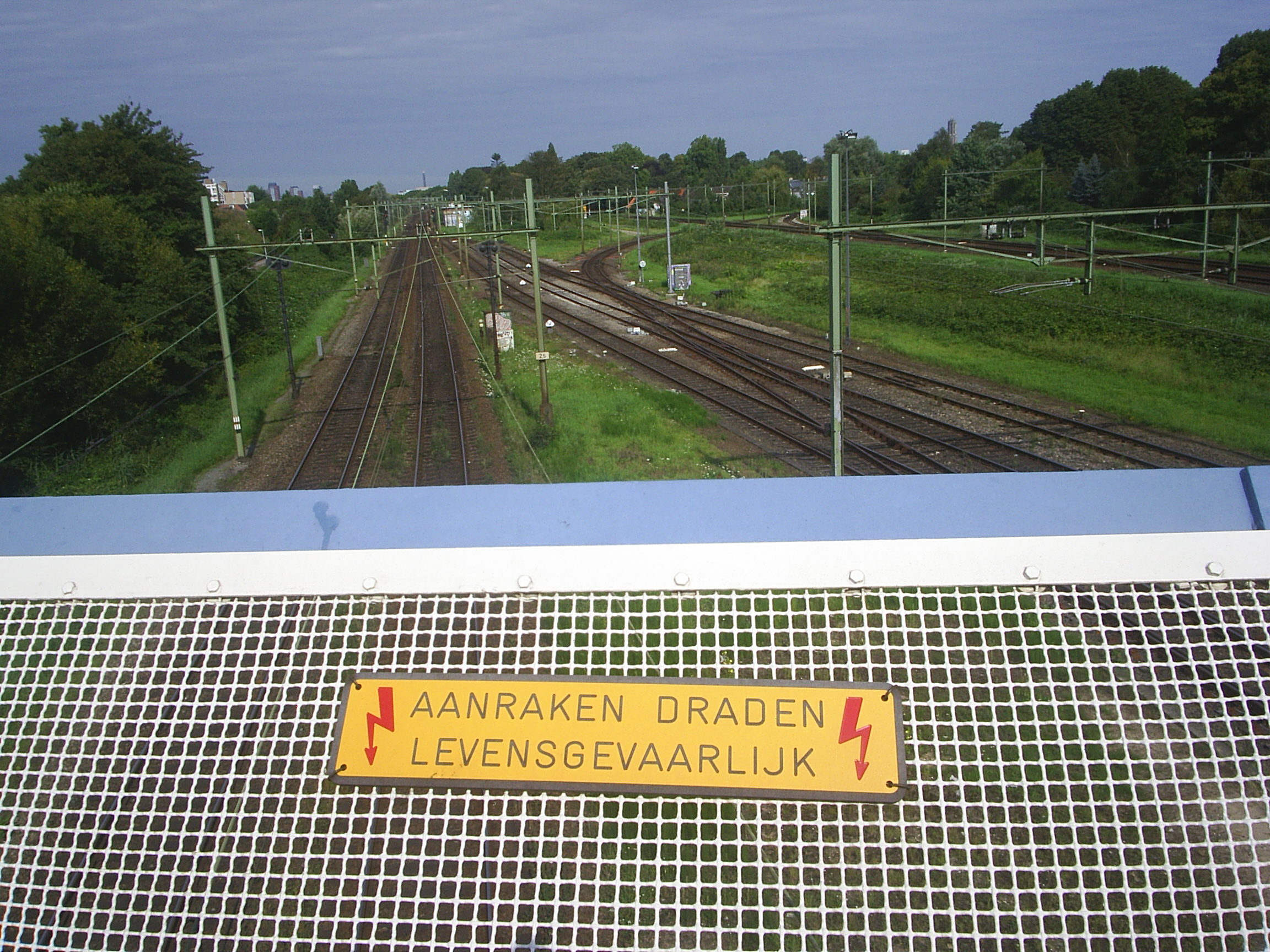 Bovenleiding bij de Malieveldaansluiting in Utrecht. I.v.m. de viersporigheid werkzaamheden Utrecht Houtem is er nu alleen de aansluiting naar Malieveld vanuit Arnhem mogelijk.